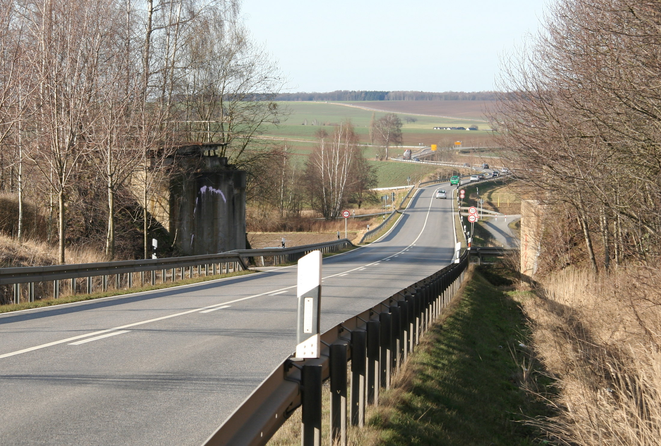 B 95 bei Wernsdorf, Thüringen, fehlende Brücke der Bahnstrecke Altenburg–Langenleuba-Oberhain.